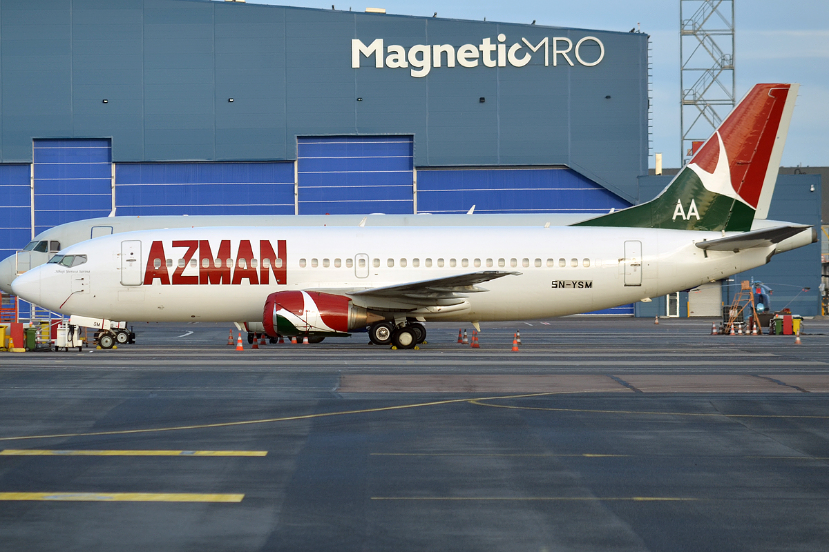 Azman Air, 5N-YSM, Boeing 737-36N